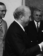 Unterzeichnung des 3. Abkommens zur Änderung des Abkommens vom 29.10.1959 über soziale Sicherheit zwischen der BRD und Spanien durch St. S. Walter Gellhoff und dem spanischen Botschafter Javier Conde im AA (v.l.n.r.: Herr Vázquez Mateo, Sozialrat der Spanischen Botschaft; Herr Linage, 1. Sekretär der Sp. B.; Herr Professor Conde, Spanischer Botschafter; Herr Munz, Auswärtiges Amt; ein anderer Herr des AA; Staatssekretär Gellhoff; Herr Dreher, AA; ein weiterer Herr des AA.)